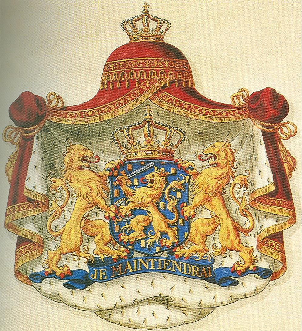 Het Rijkswapen getekend in 1907